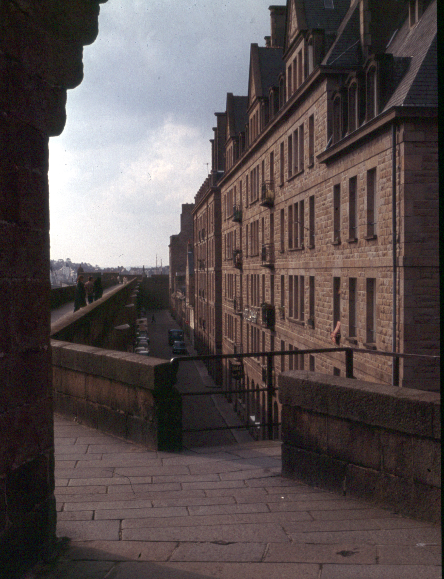 Saint-Malo 1978